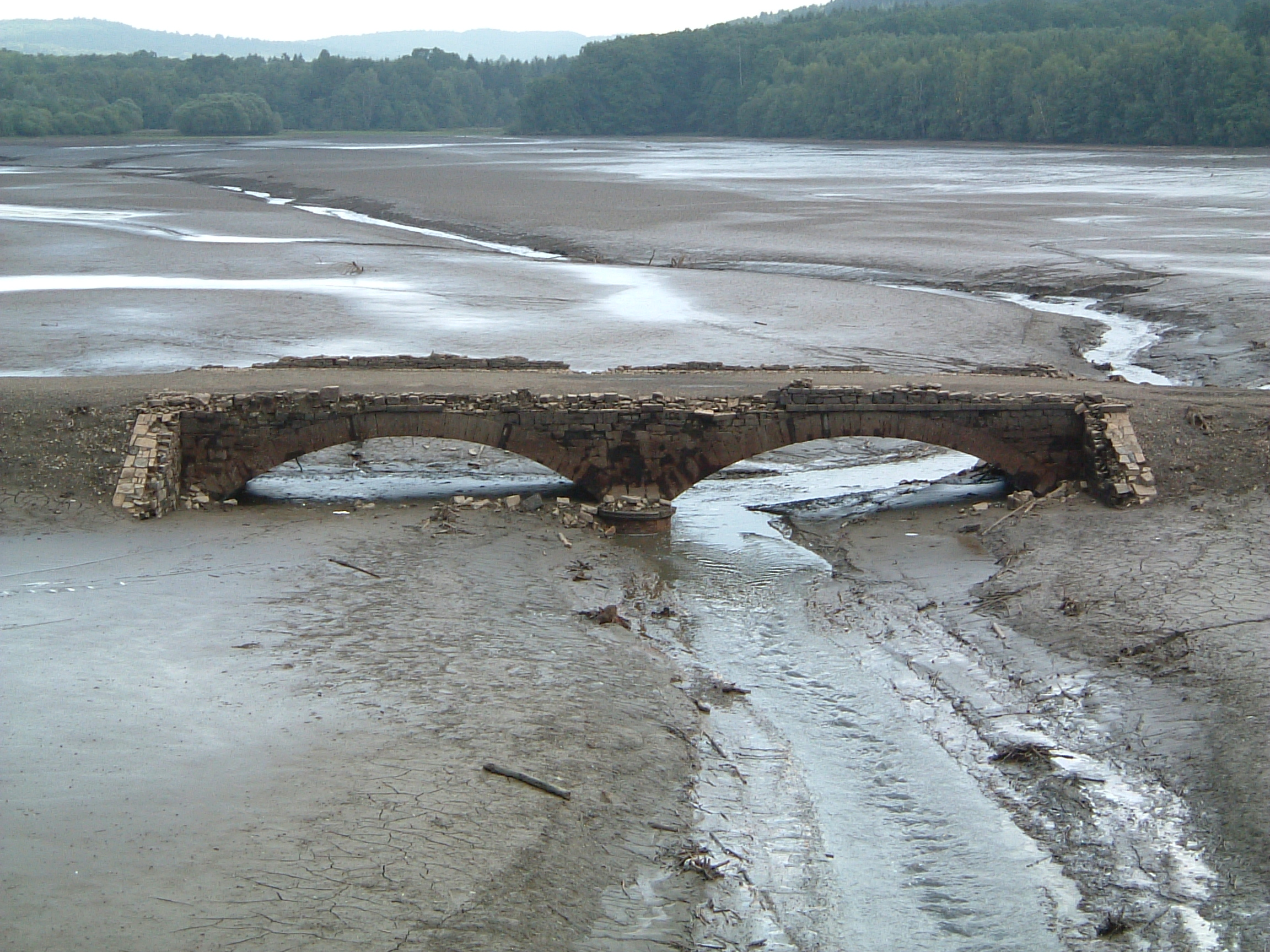 Möhne-Talsperre - alte Brücke im Hevebecken Das Hevebecken, ein Arm des Möhnesees, wurde 2003 im Rahmen einer Brückenreparatur vollständig abgelassen.